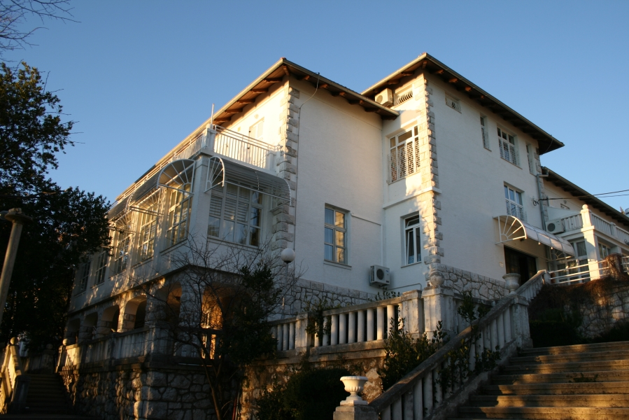 Thalassotherapia u Crikvenici, vila Ružmarinka